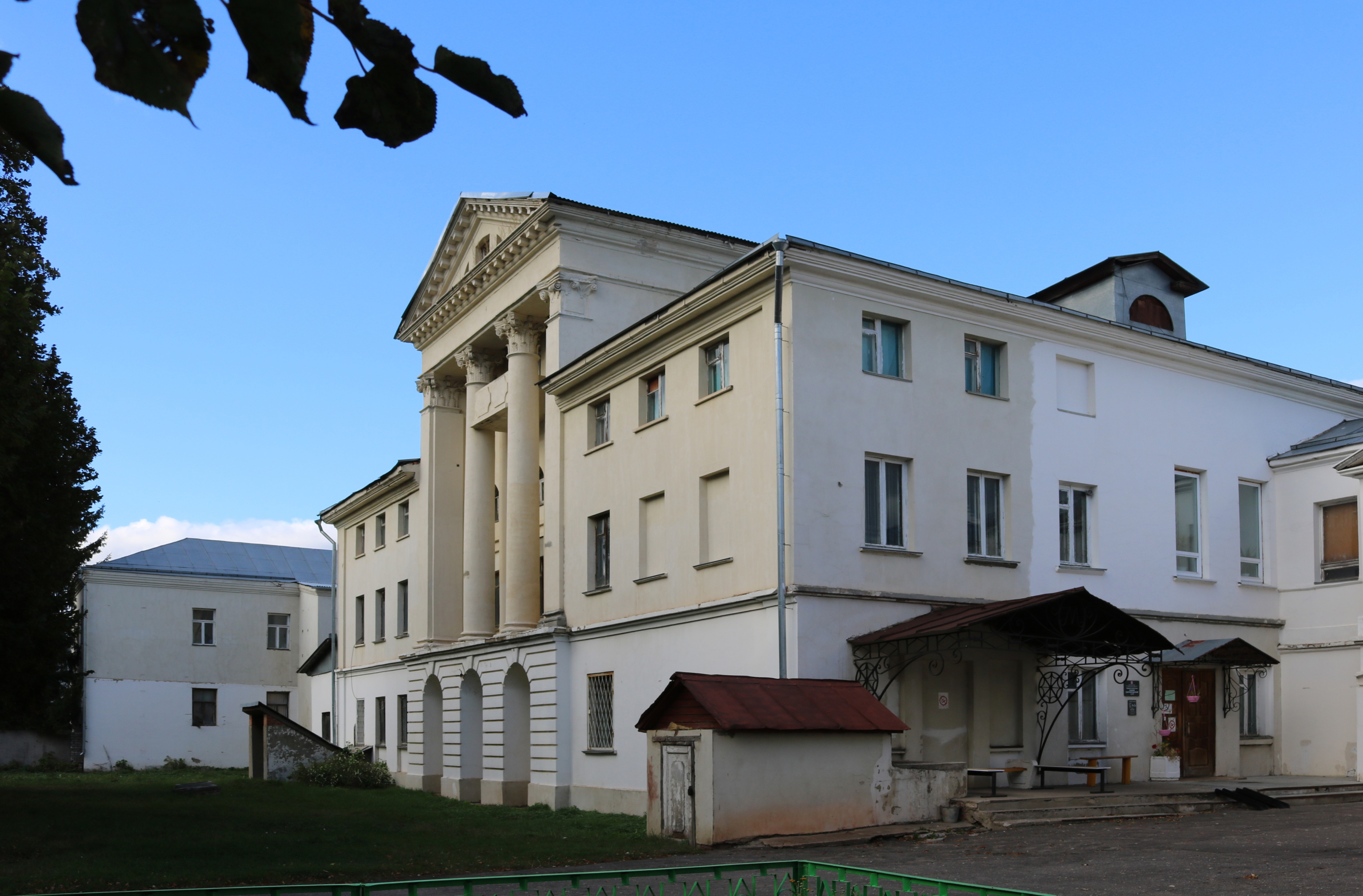 Усадьба Маслова: улица Советская, 38, Алексин, Алексинский район, Тульская область